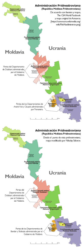 Mapa administrativo de Transnistria, República Moldava Pridnestroviana. Traducido al español, completado y mejorado a partir de los trabajos de Aotearoa (en polaco) [Naddniestrze-administracja.png] y Spiridon Ion Cepleanu (en inglés) [Pridnestrian_Administration.png]